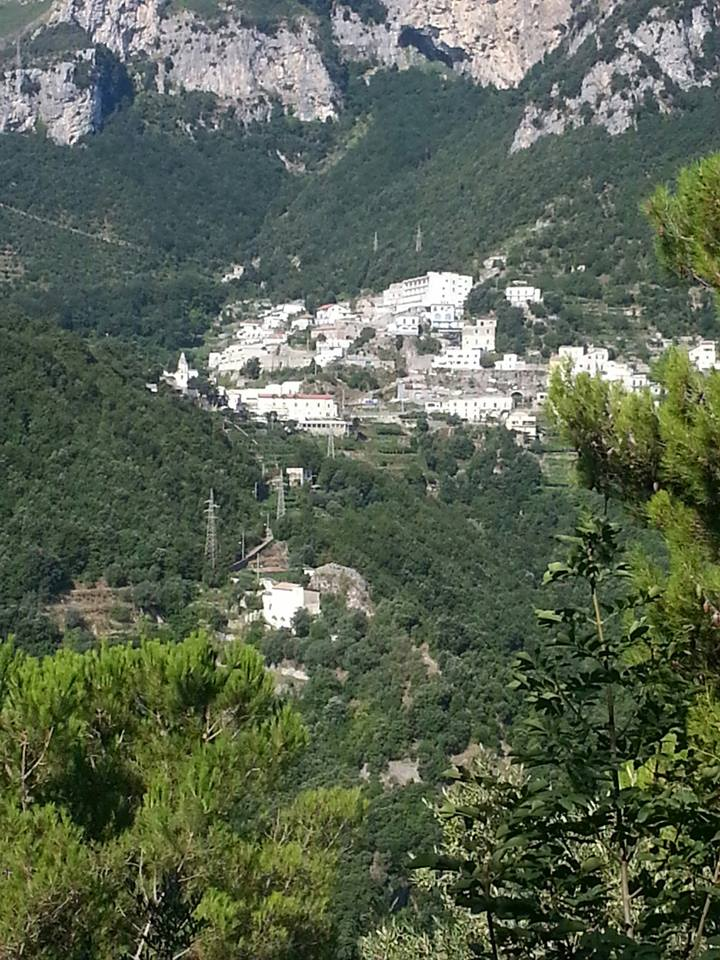 Scorcio panoramico di Pogerola